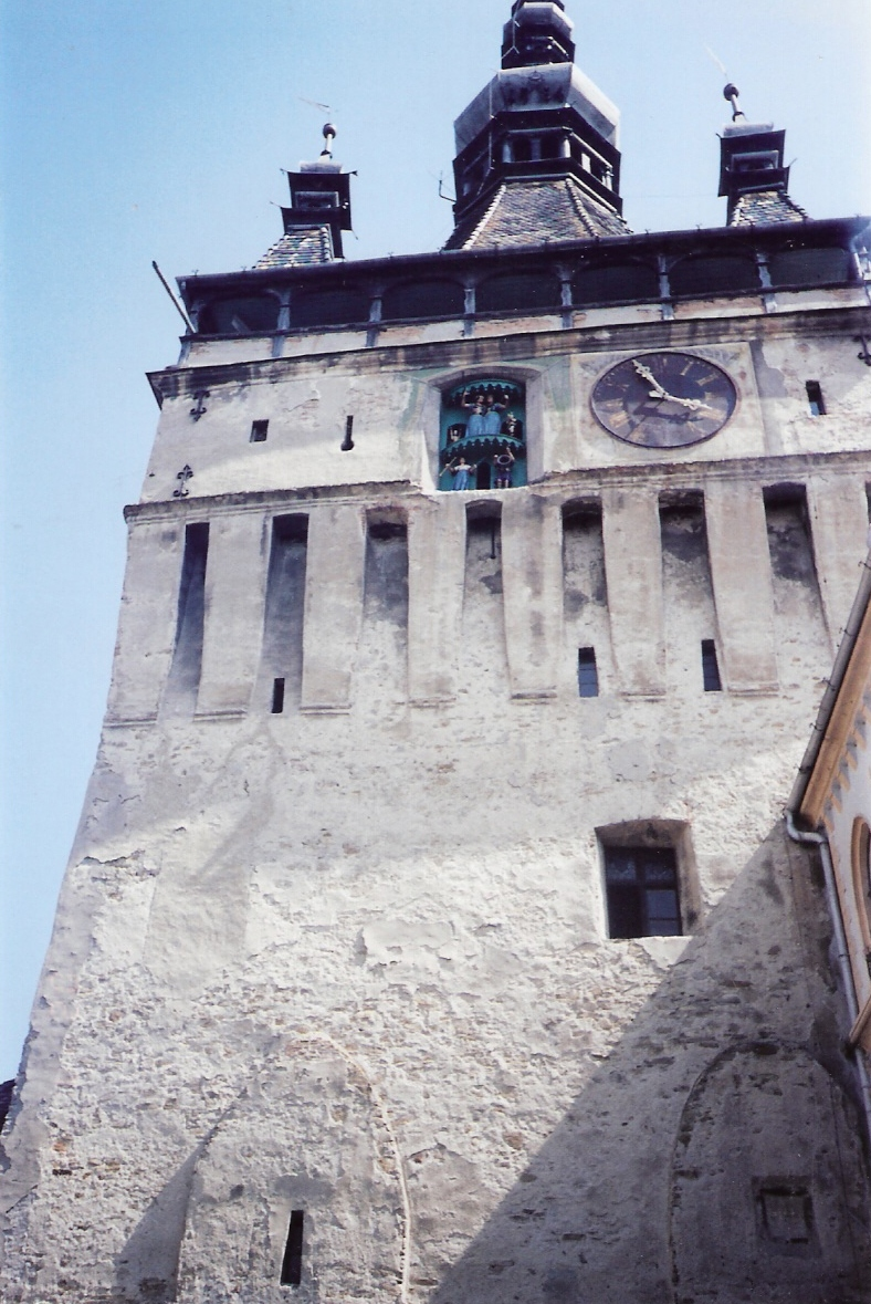 sighisoara, romania